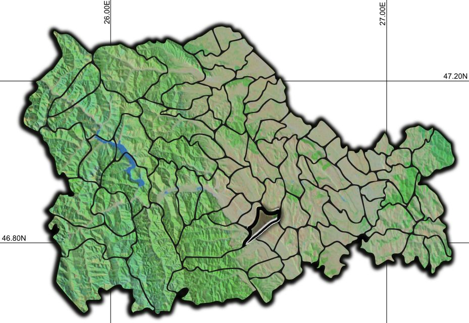 Roznov jud Neamt.